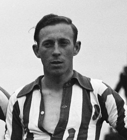 Collectie / Archief : Fotocollectie Anefo Reportage / Serie : [ onbekend ] Beschrijving : 11-tal Heerenveen Datum : 30 mei 1948 Trefwoorden : sport, voetbal Fotograaf : Noske, J.D. / Anefo Auteursrechthebbende : Nationaal Archief Materiaalsoort : Glasnegatief Nummer archiefinventaris : bekijk toegang 2.24.01.09 Bestanddeelnummer : 902-7743